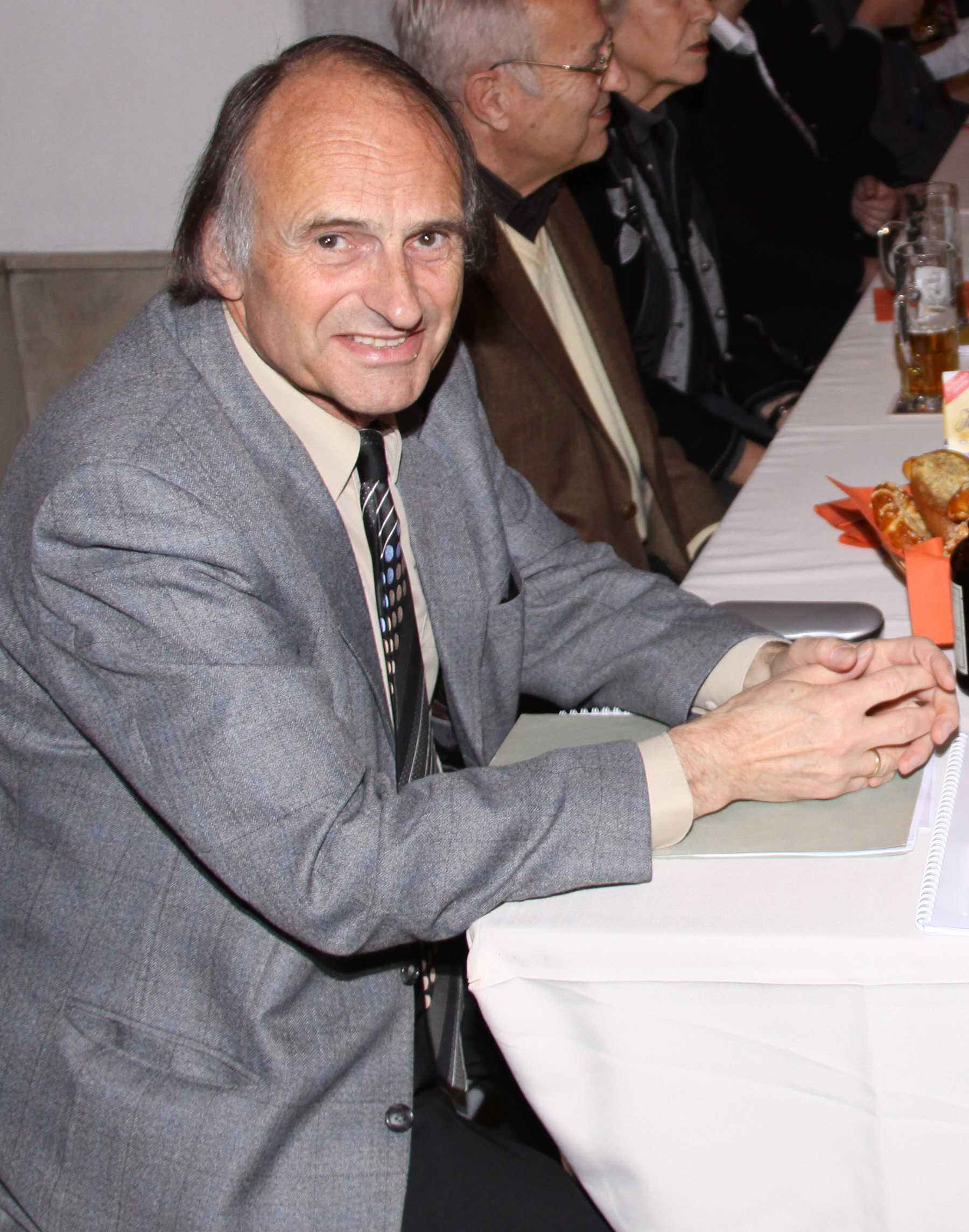 Bernhard Jähnig